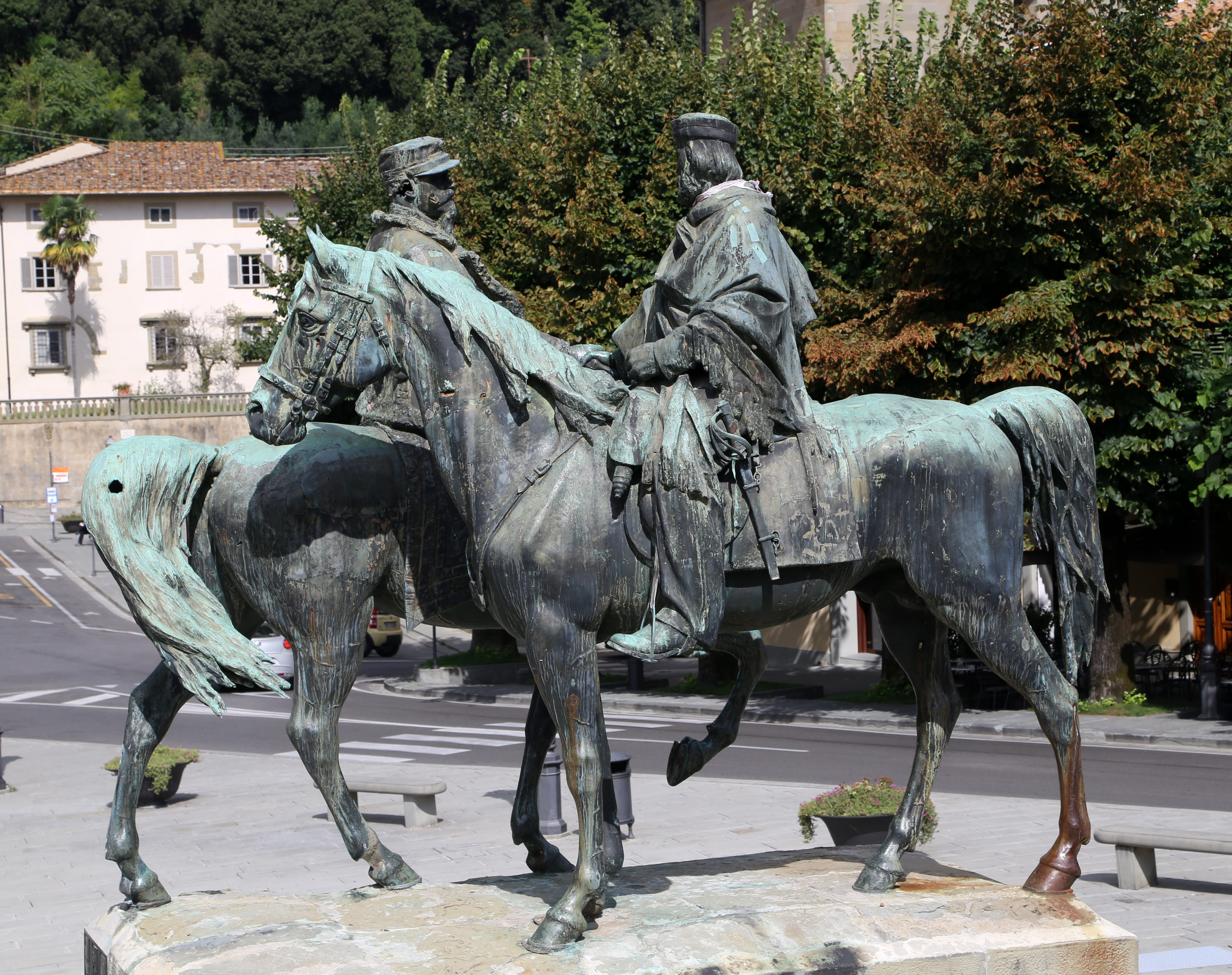 Denkmal, Piazza Mino, Fiesole